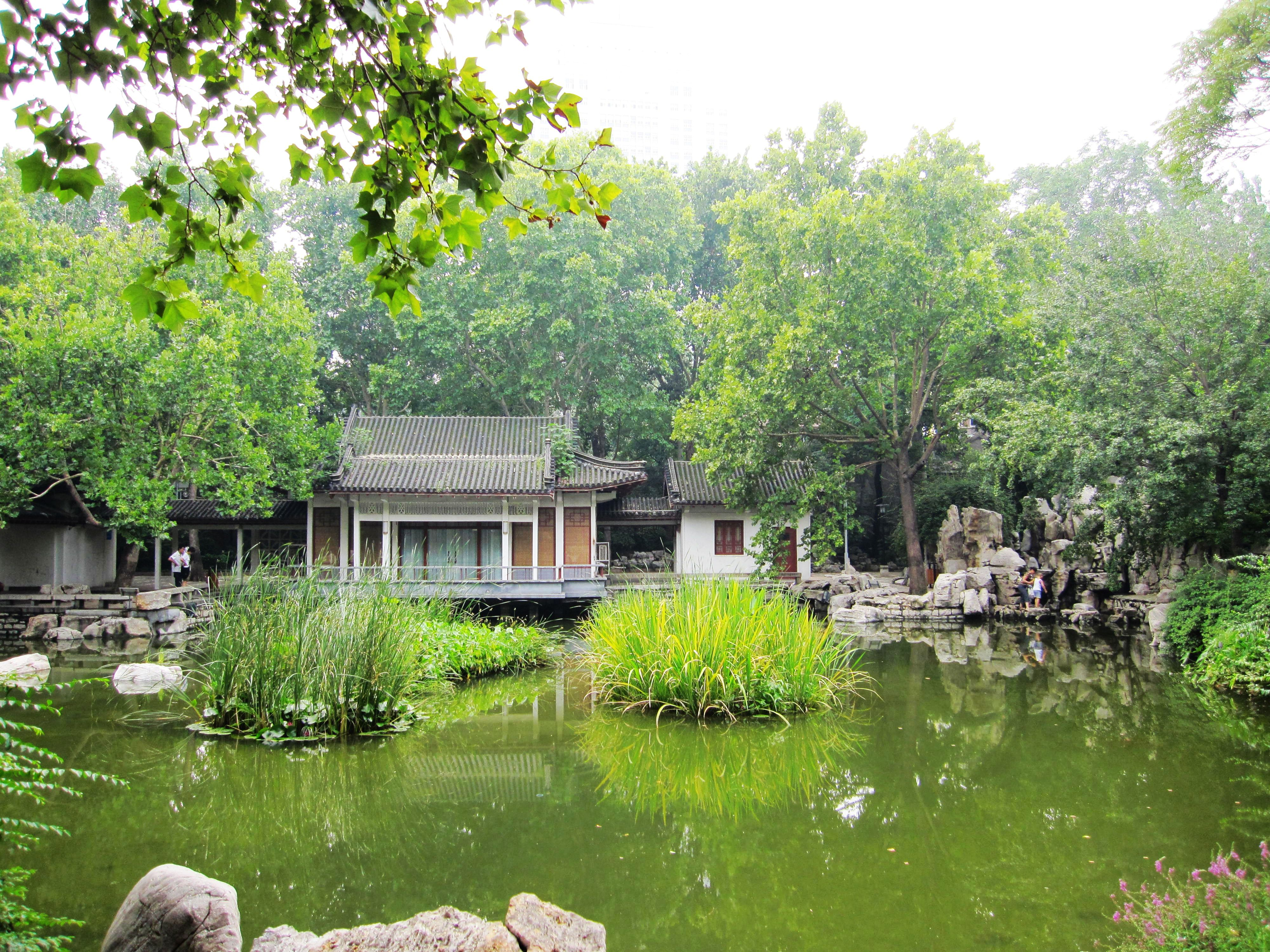 济南中山公园西侧池塘。